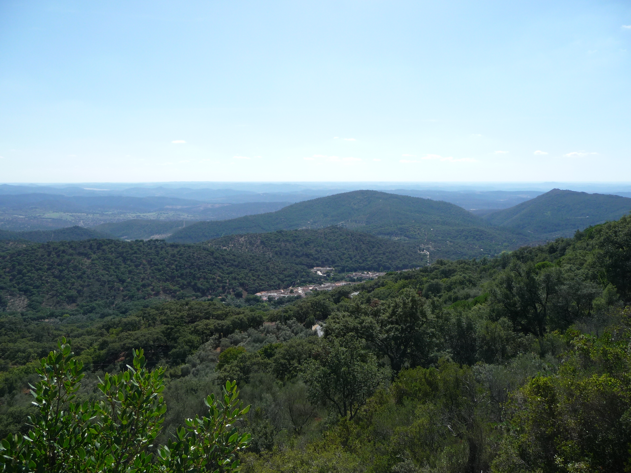 SierraDeAracena-P1040654.JPG